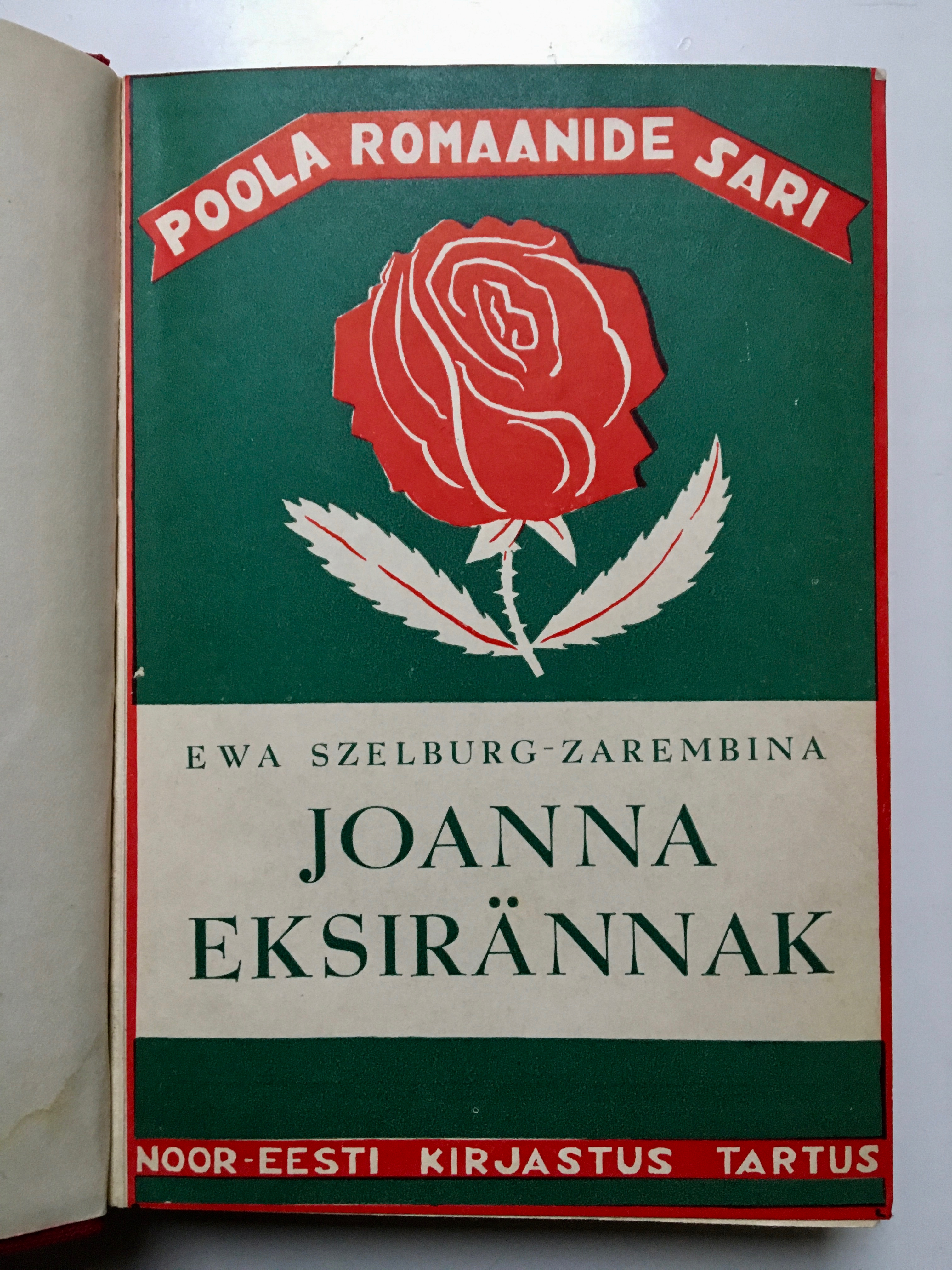 Poola romaanide sari